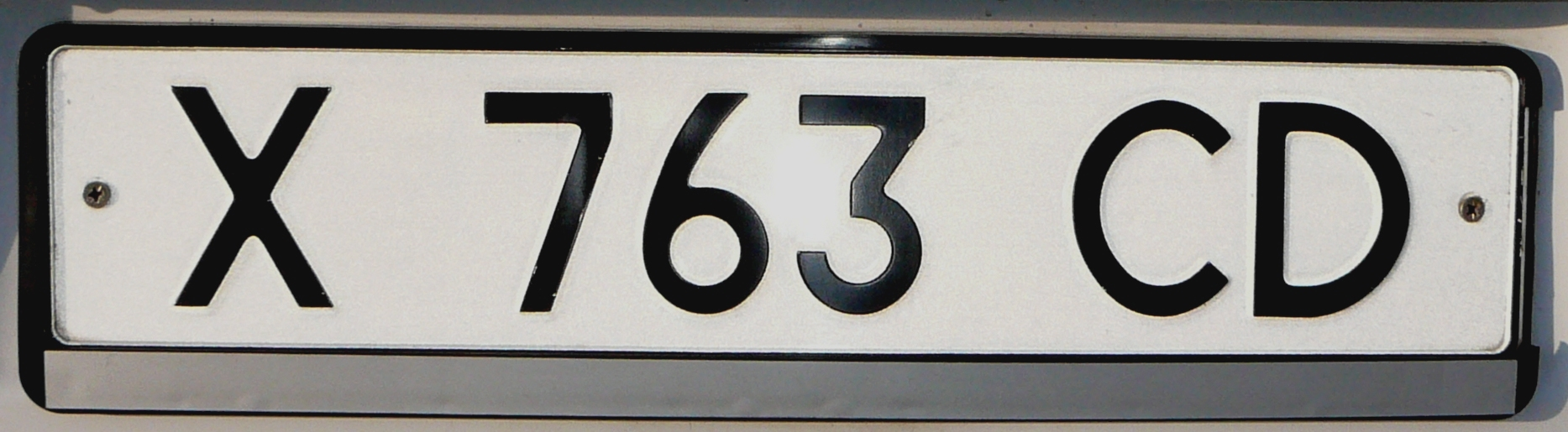 Казахстанский автомобильный номер выданный на юридическое лицо. Номер "X763CD". Буква "X" - перед цифрами обозначает "Южно-Казахстанская Область".